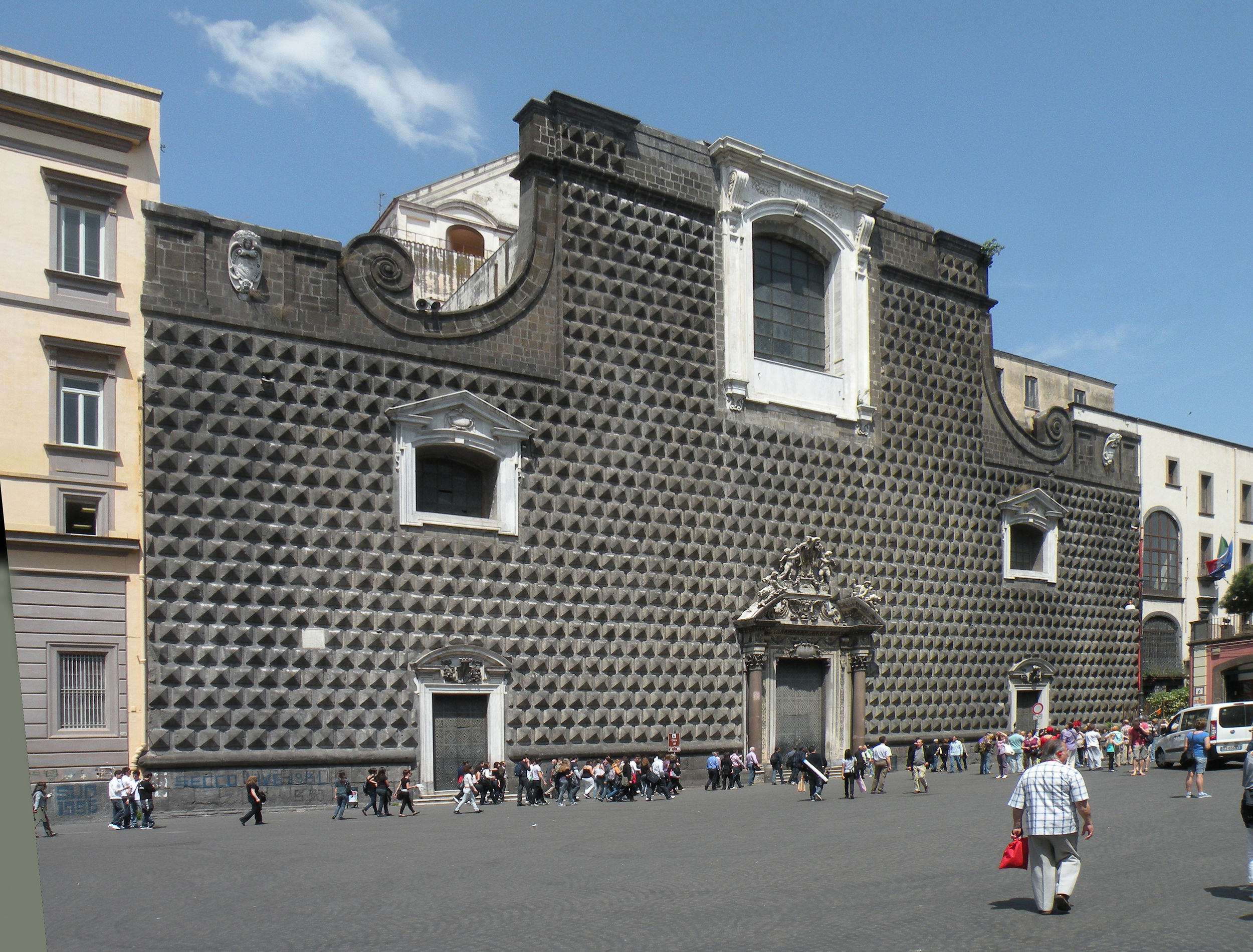 Новая церковь Христа